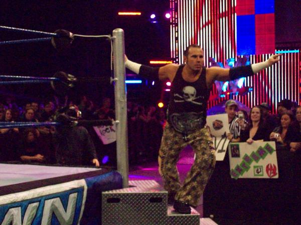 V1